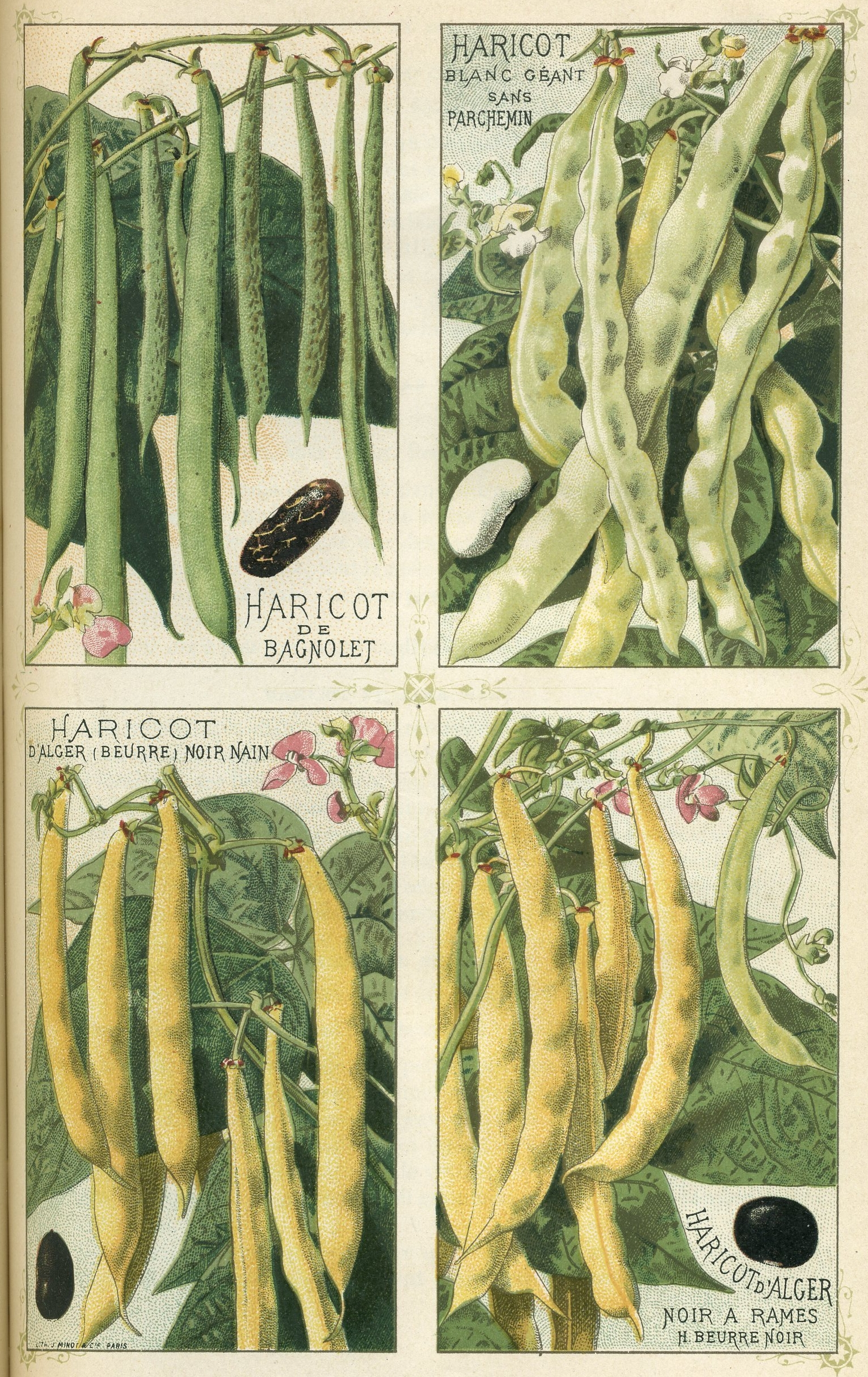 Variétés de haricots (Phaseolus vulgaris) publiées dans Les plantes potagères Vilmorin-Andrieux et Cie, 1891. 1. Haricot de Bagnolet; 2. Haricot blanc géant sans parchemin; 3. Haricot d'Alger, (beurre) noir nain; 4. Haricot d'Alger, noir à rames, haricot beurre noir.